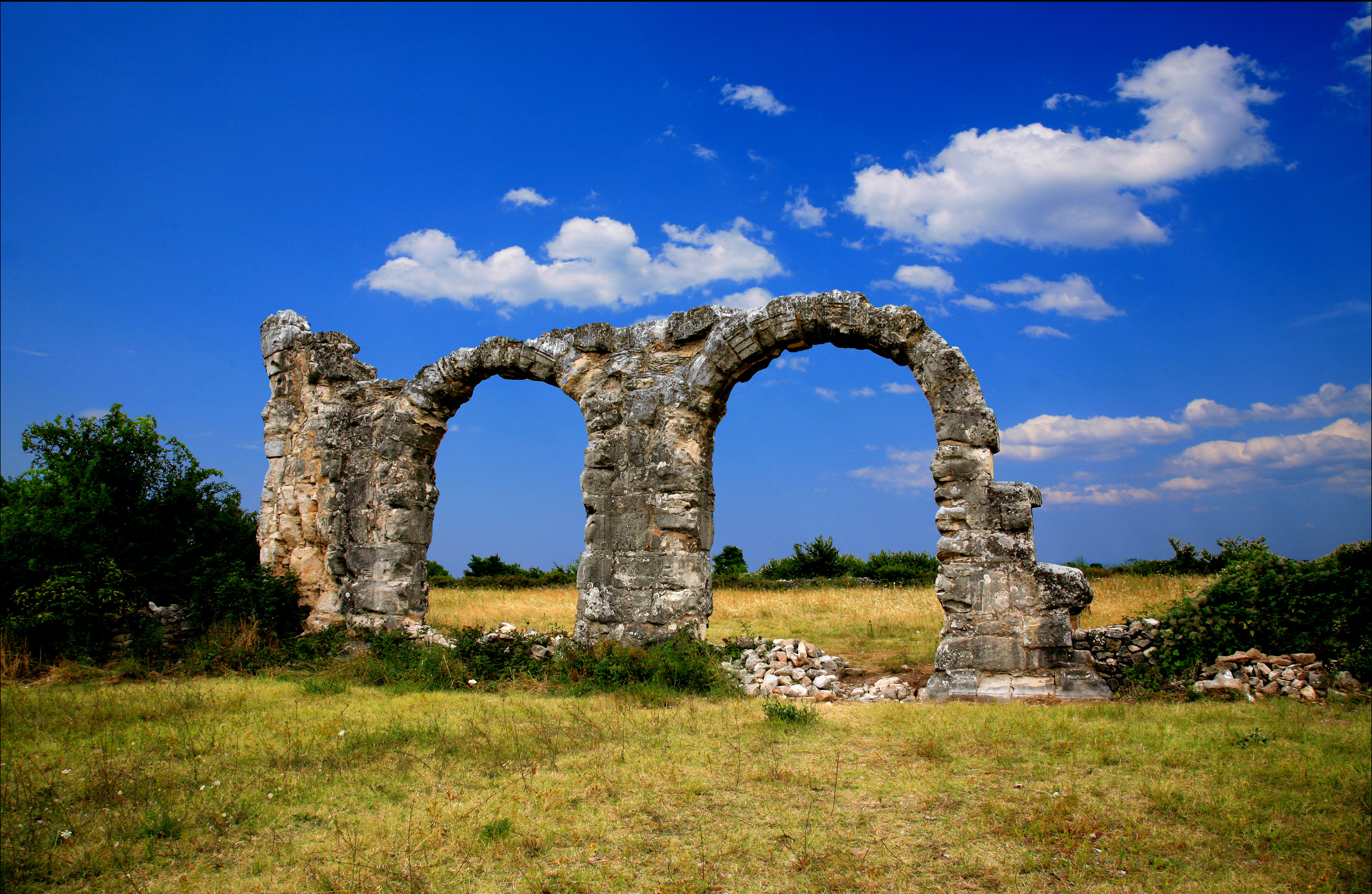 Gradina